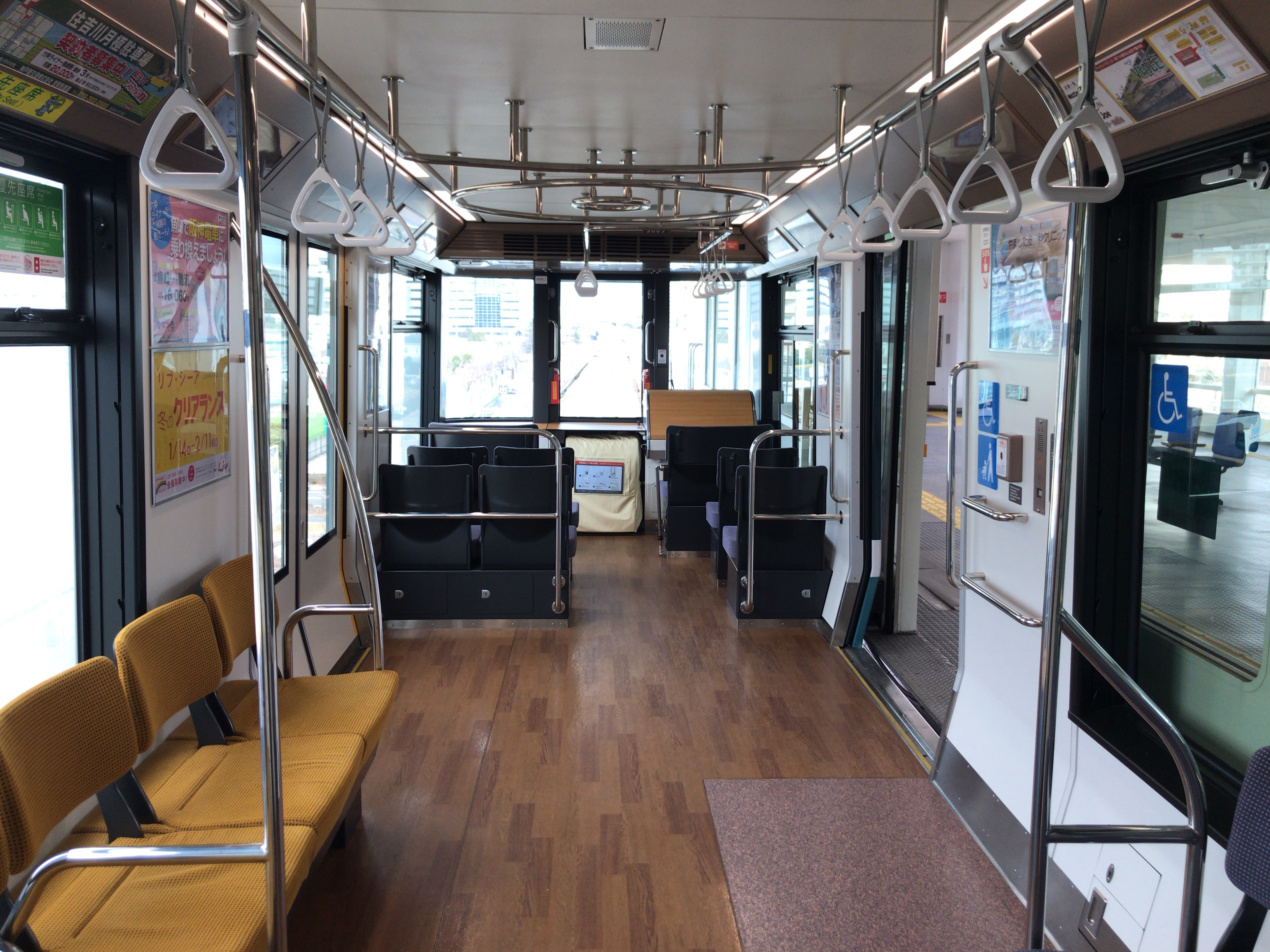 六甲ライナー3000形の車内。2020年1月22日撮影。3109F3109号車(住吉方先頭車)。